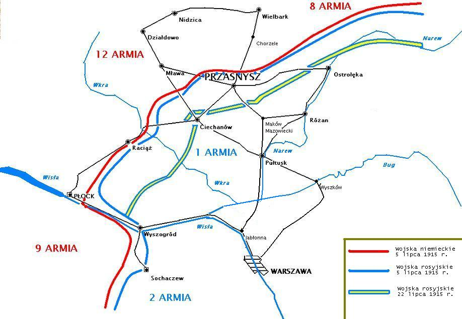 Linia frontu wschodniego przechodząca przez przasnysz w lipcu 1915 roku